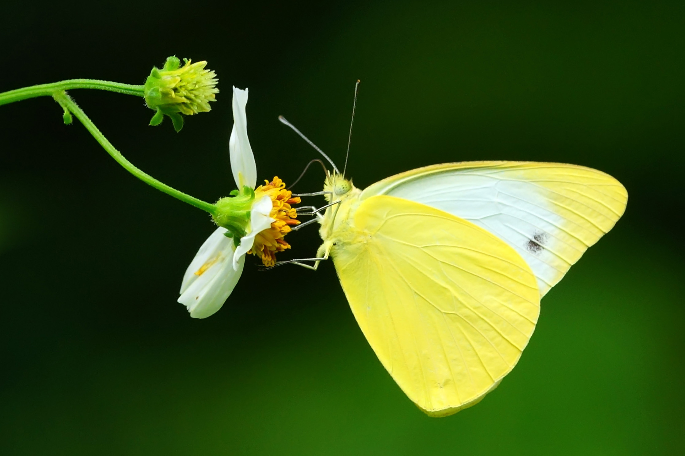 中文（台灣）: 黃尖粉蝶 Appias paulina minato